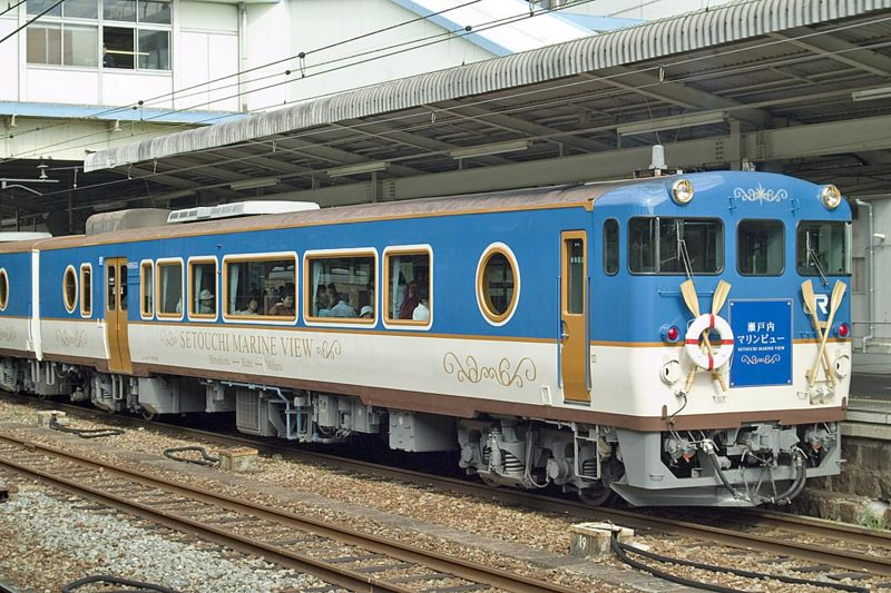 撮影場所：広島駅